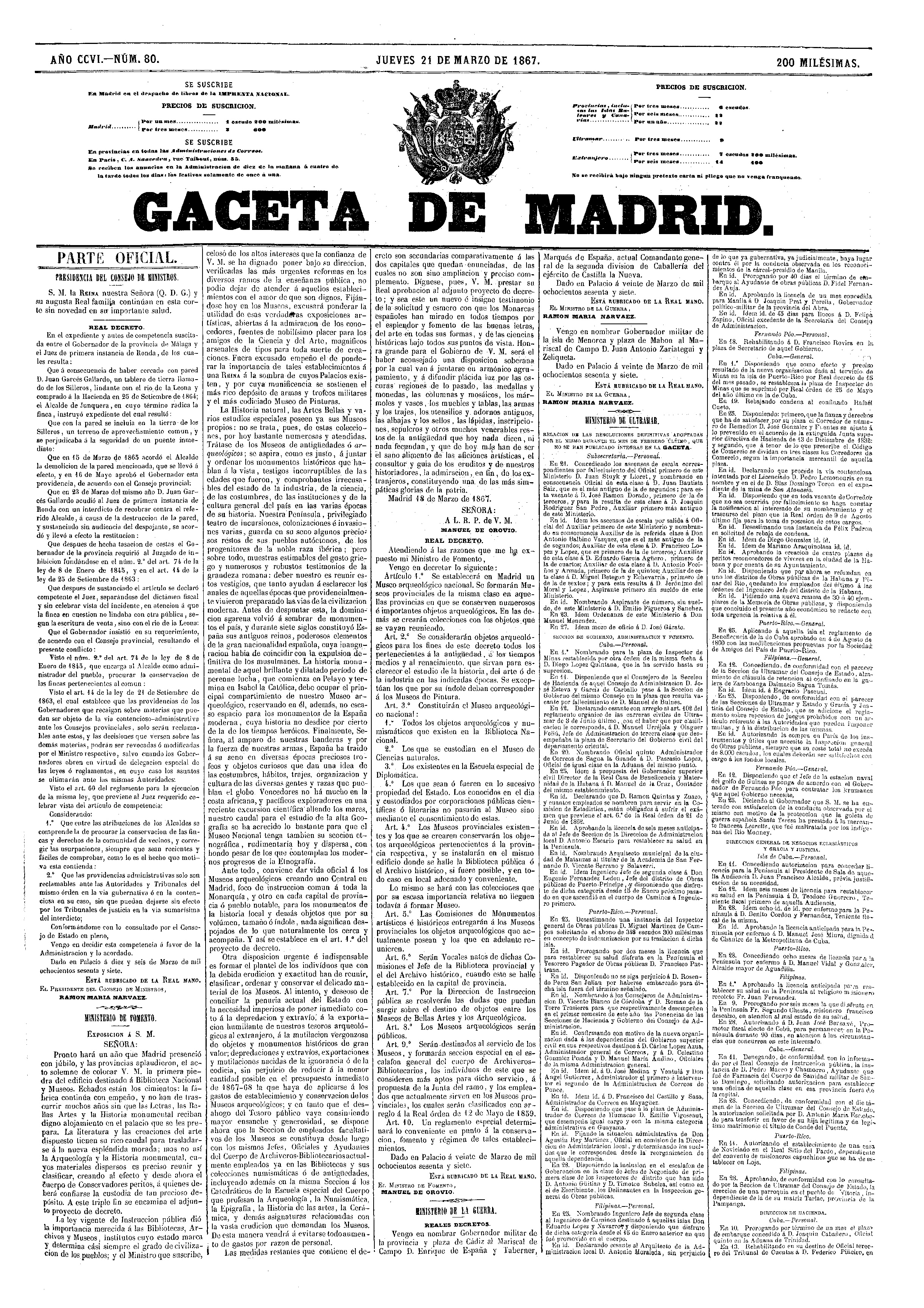 Portada de la Gaceta de Madrid del 21 de marzo de 1867.